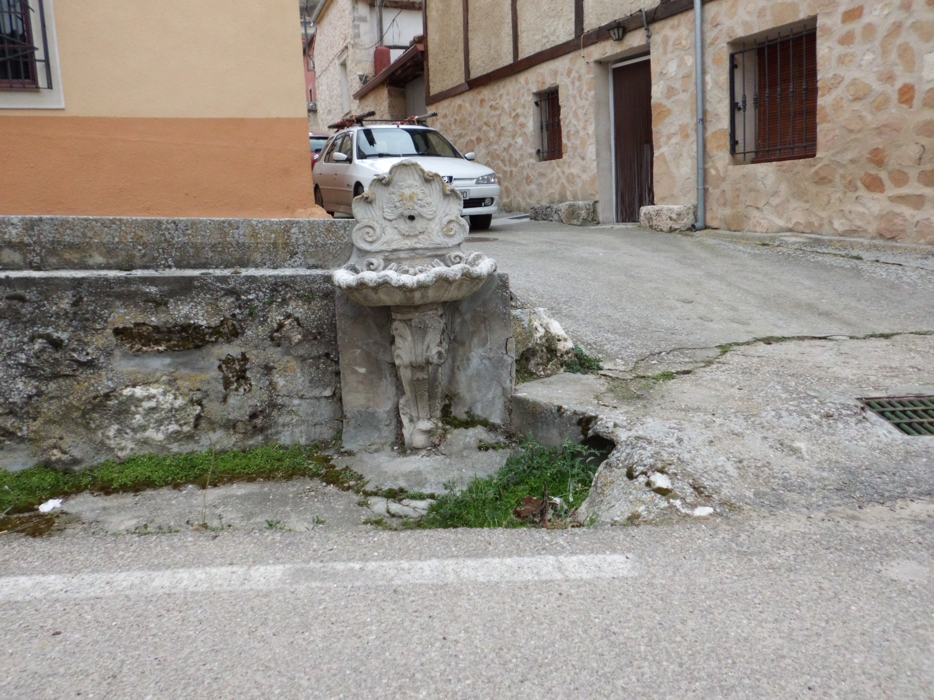 Fuente pública en la localidad segoviana de Fuentesoto, España.